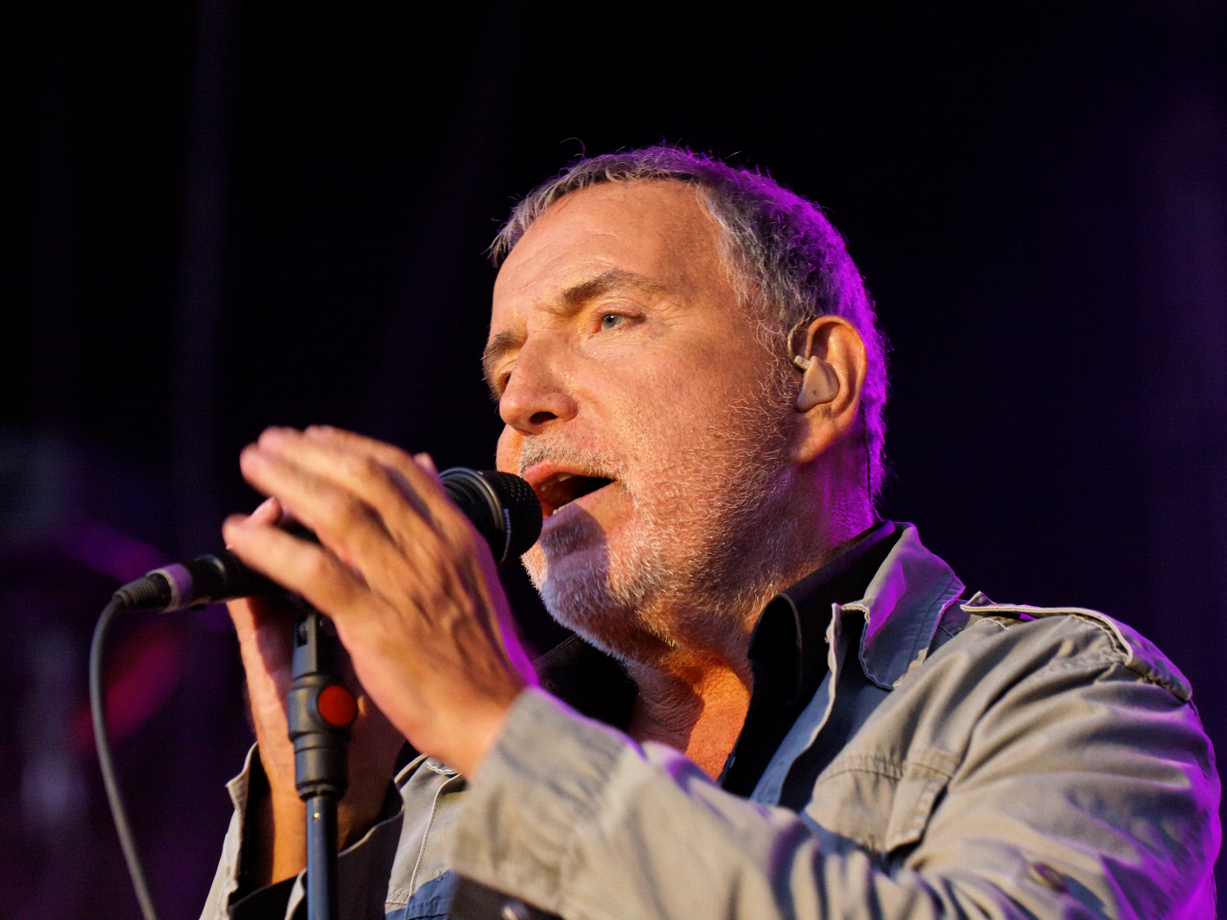 Bernard Lavilliers en concert sur la scène Landaoudec lors du festival du bout du Monde à Crozon dans le Finistère (France).